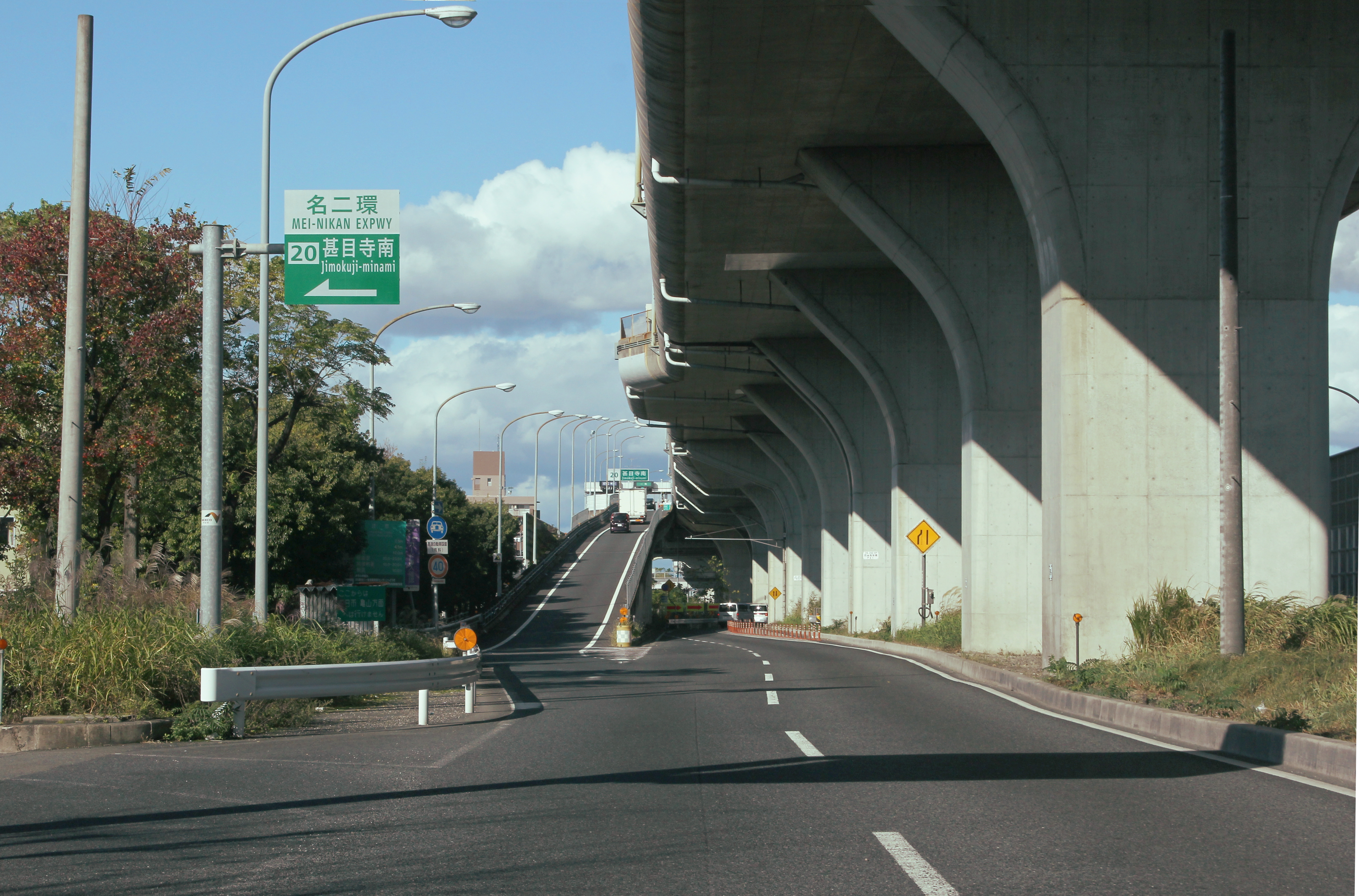 名二環 甚目寺南IC